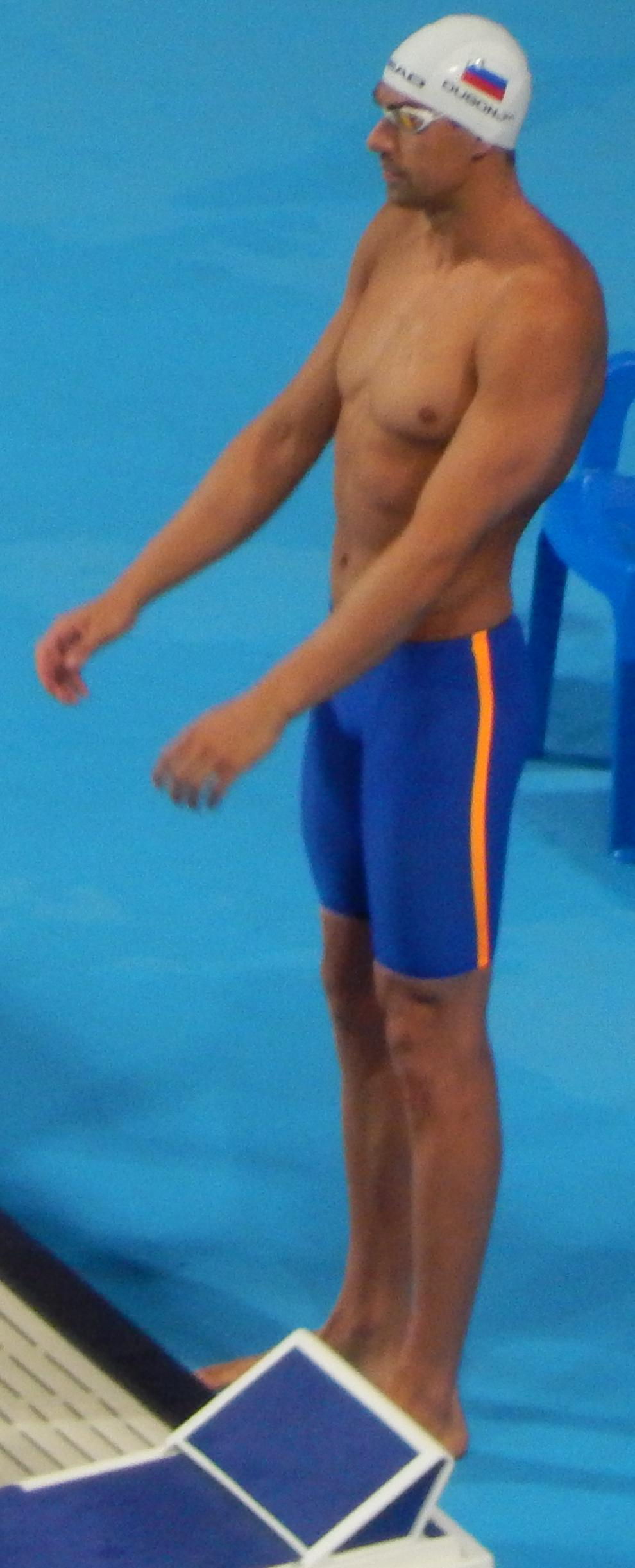 Дамир Дугонич в финале 50 метровки брассом в Казани